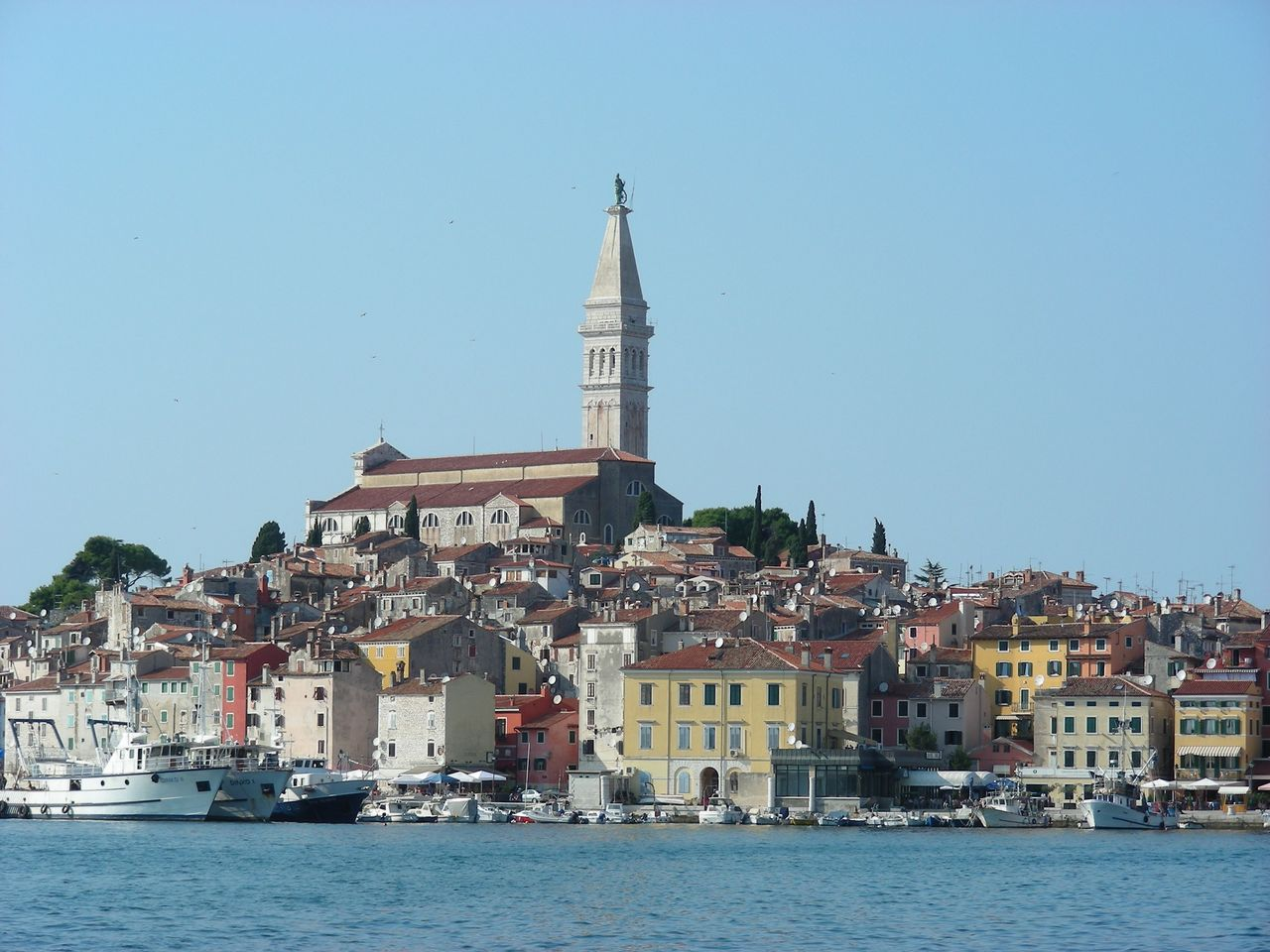 Grad Rovinj